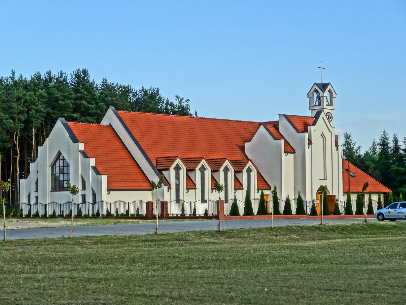 Kościół parafialny, rzymskokatolicki pod wezwaniem Najświętszej Marii Panny Wspomożycielki Wiernych w Niemczu, gmina Osielsko, powiat bydgoski